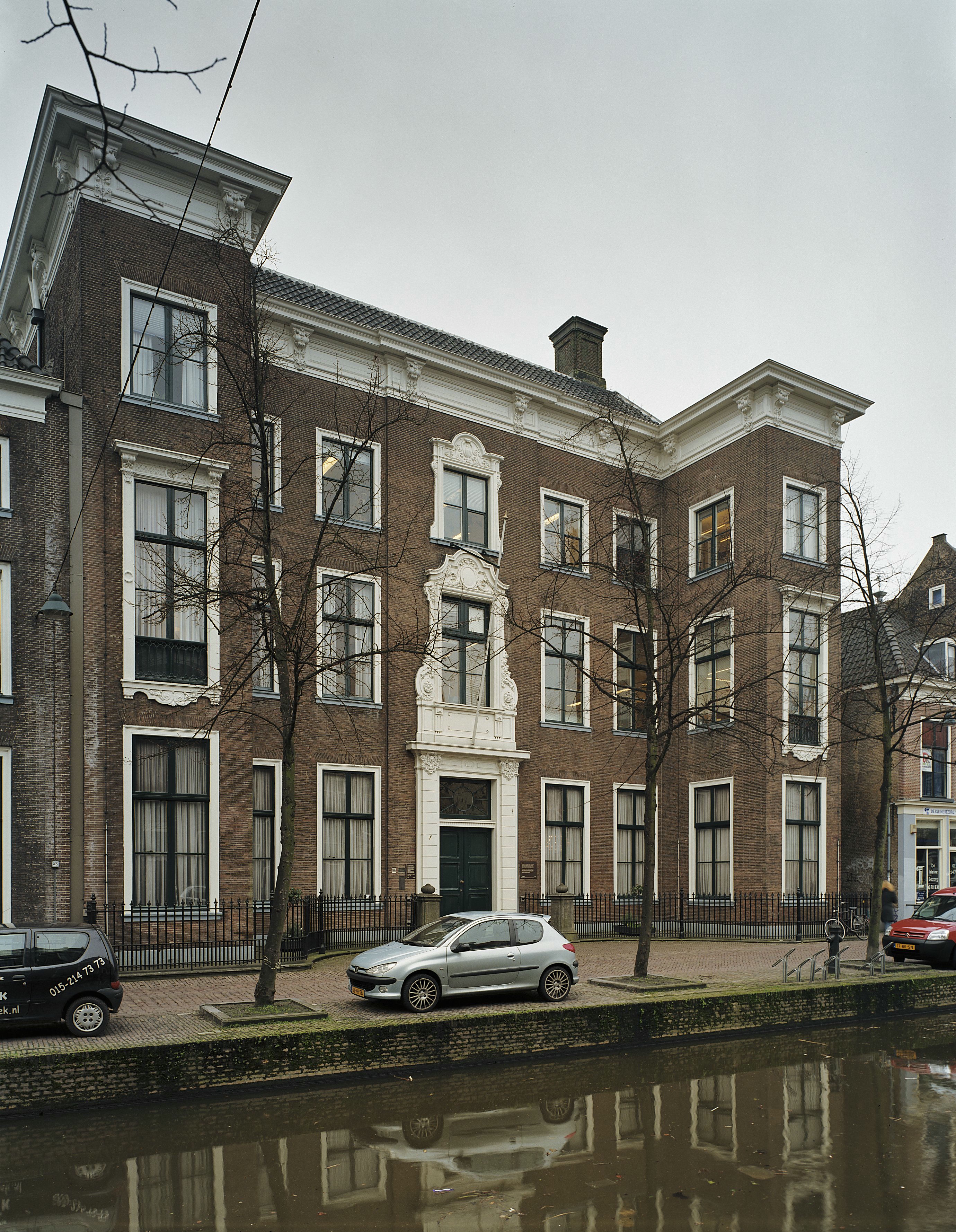 Ingangspartij/ Guirlande: Voorgevel, en omlijsting van ingangspartij verrijkt met guirlandes (opmerking: Gefotografeerd voor Monumenten In Nederland Zuid-Holland)